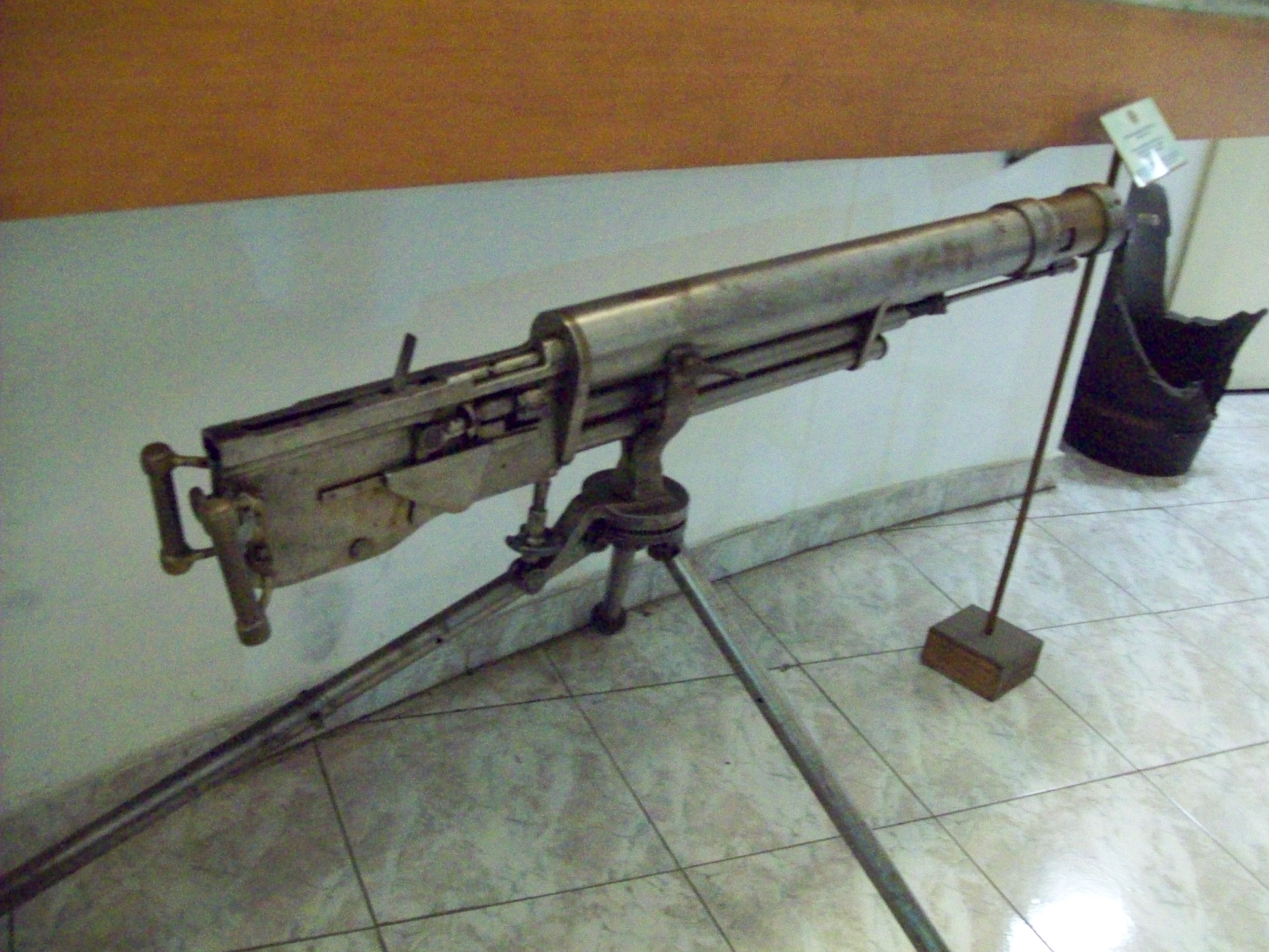 Ametralladora Fittipaldi expuesta en el Museo de Armas de la Nación, ciudad de Buenos Aires, Argentina 2014.